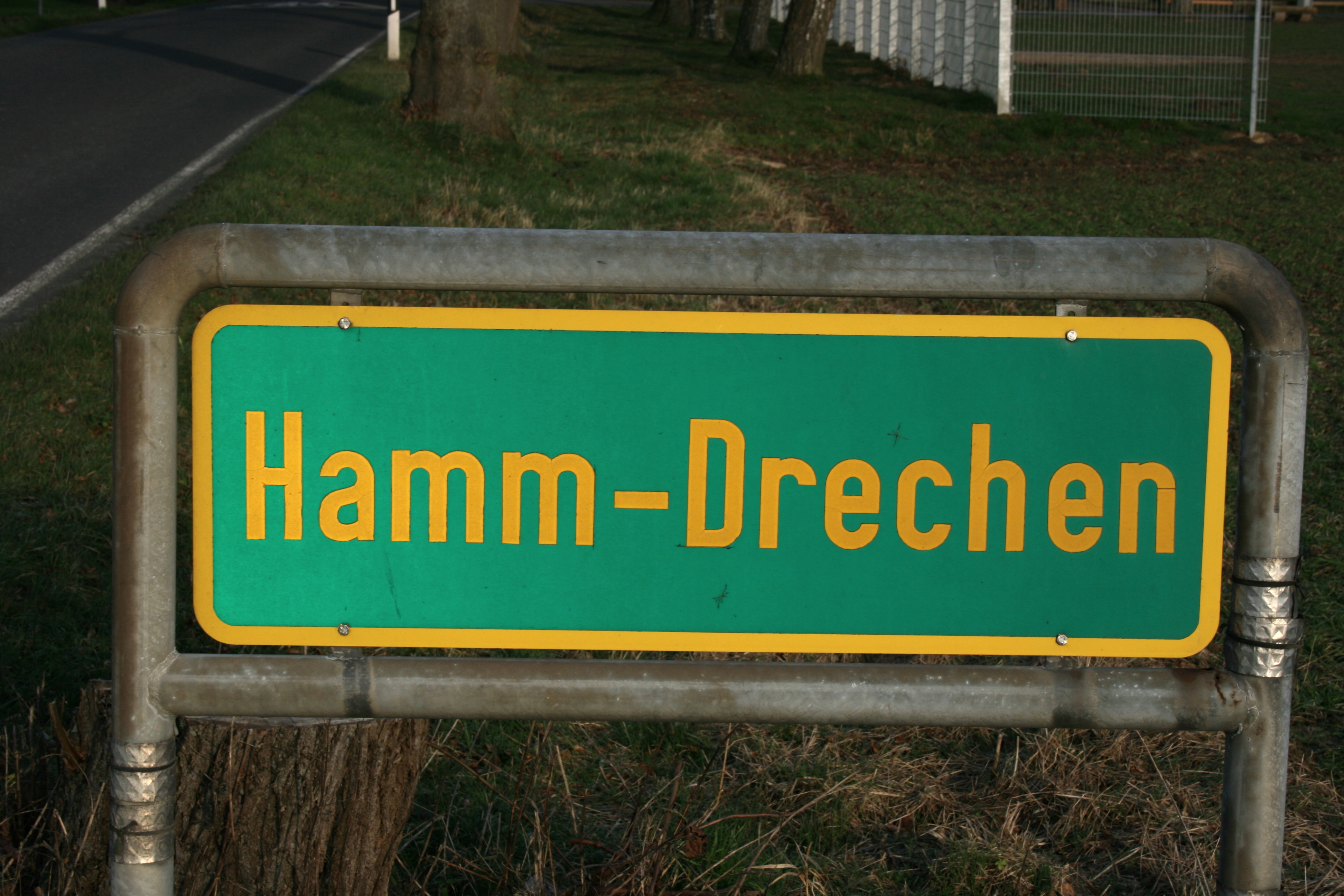 Ortshinweistafel Hamm–Drechen – Stadt Hamm - Nordrhein–Westfalen